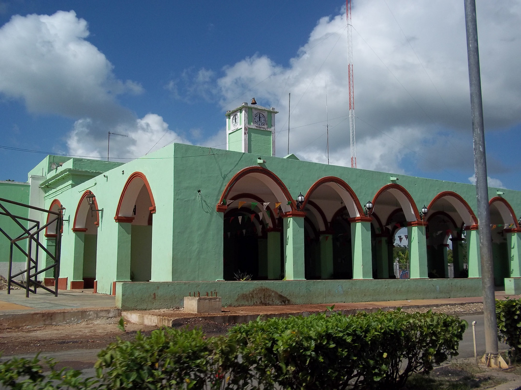 Ayuntamiento de Calotmul